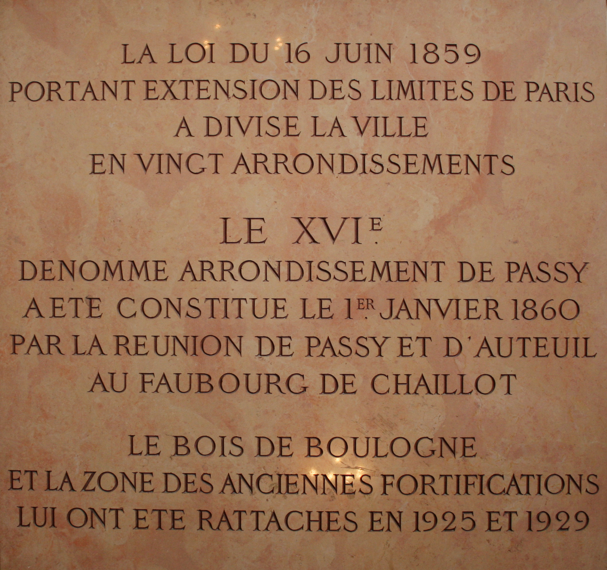 Plaque commemorant la creation du XVIème arrondissement